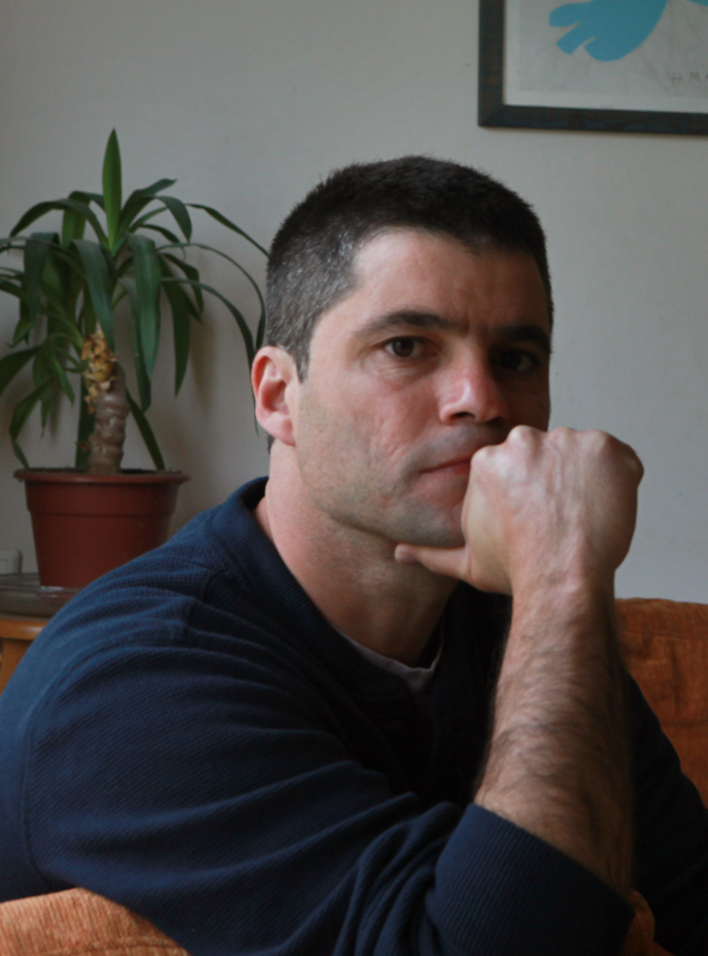 גיל כהן-מגן